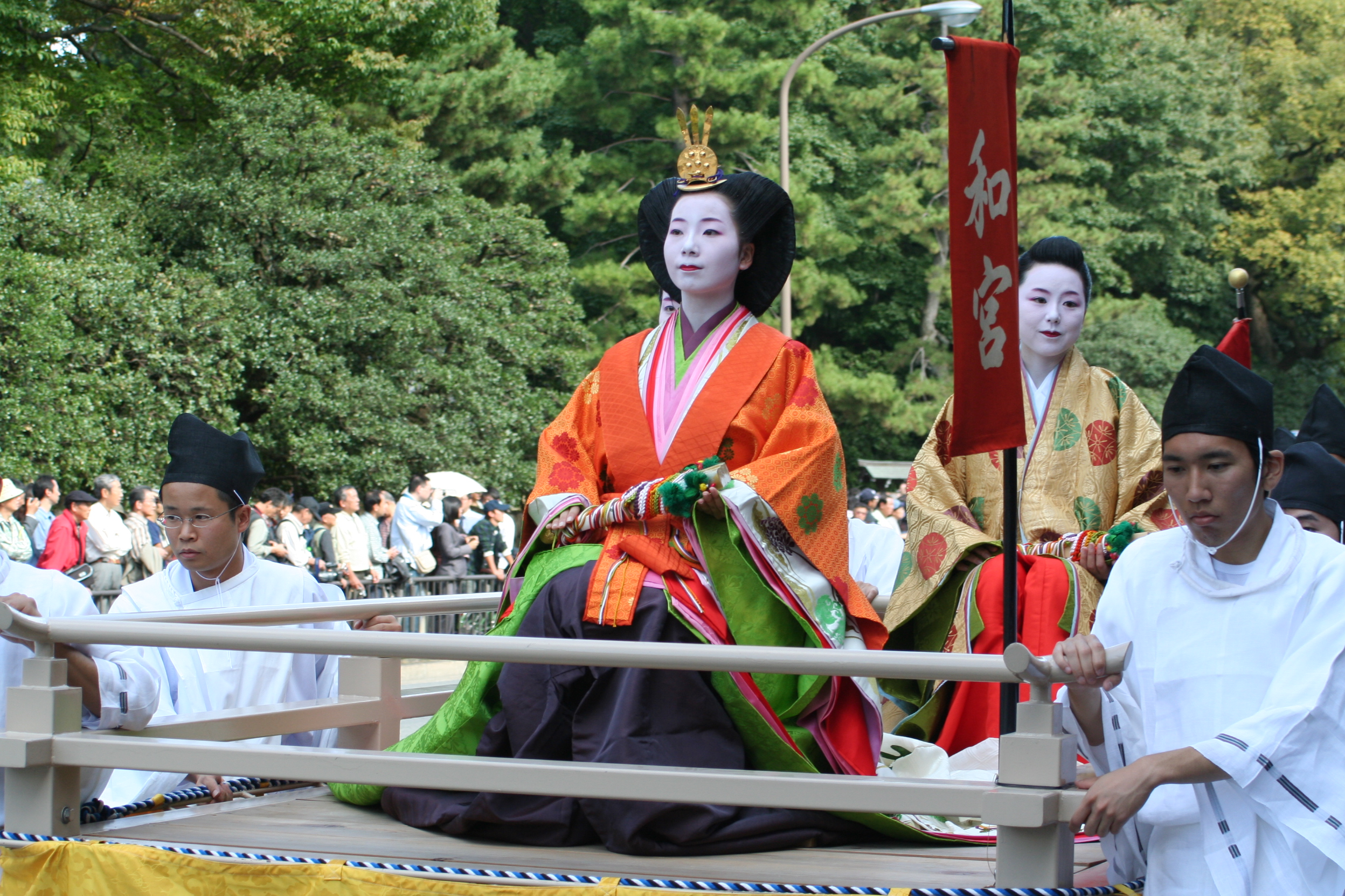 京都府京都市にて開催された時代祭。正午の御所から平安神宮までの行進の様子。2009年10月22日撮影。